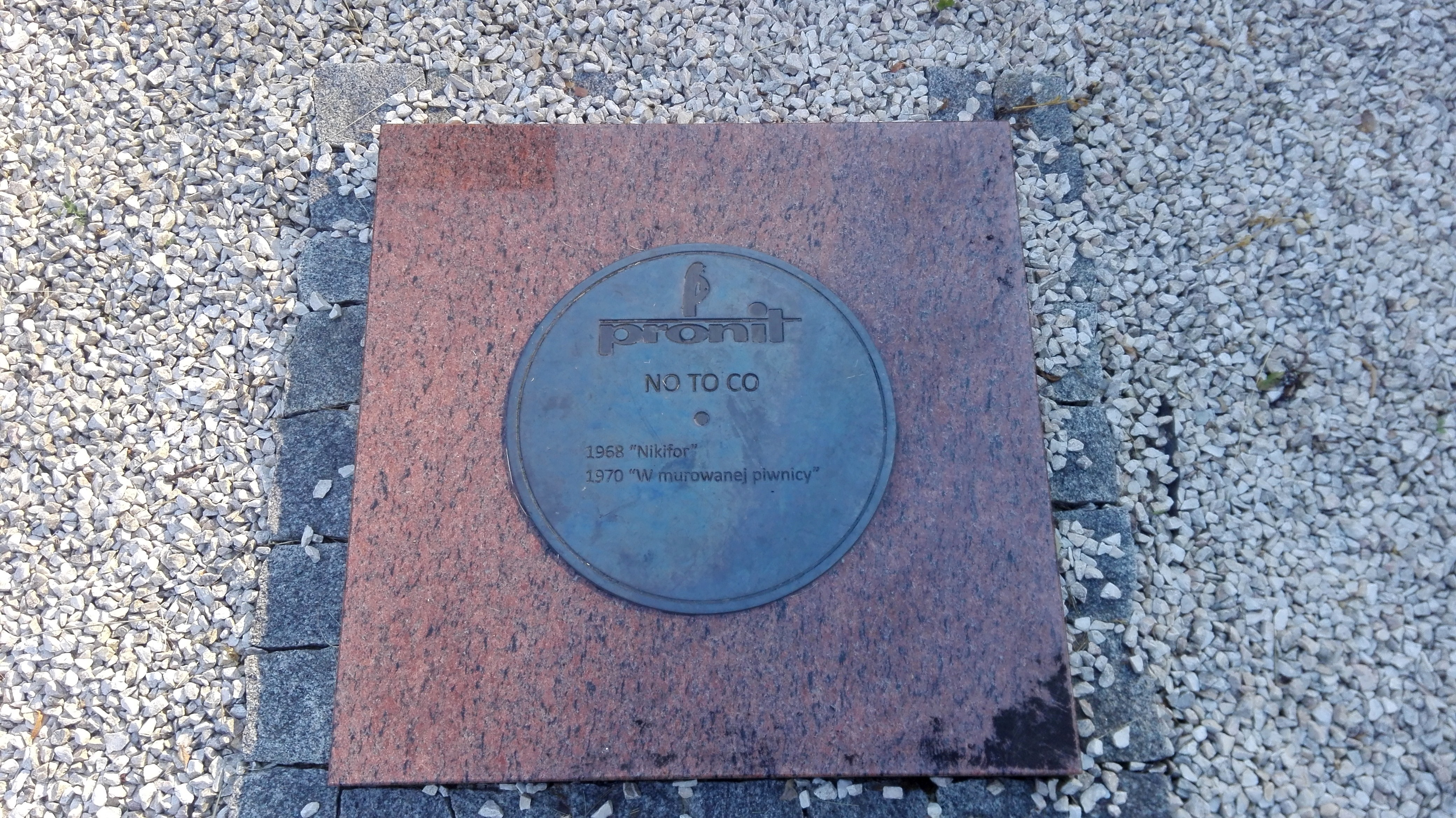 Pionki, w Centrum Aktywności Lokalnej została utworzona Izba Regionalna „Czarnej Płyty”, No To Co.